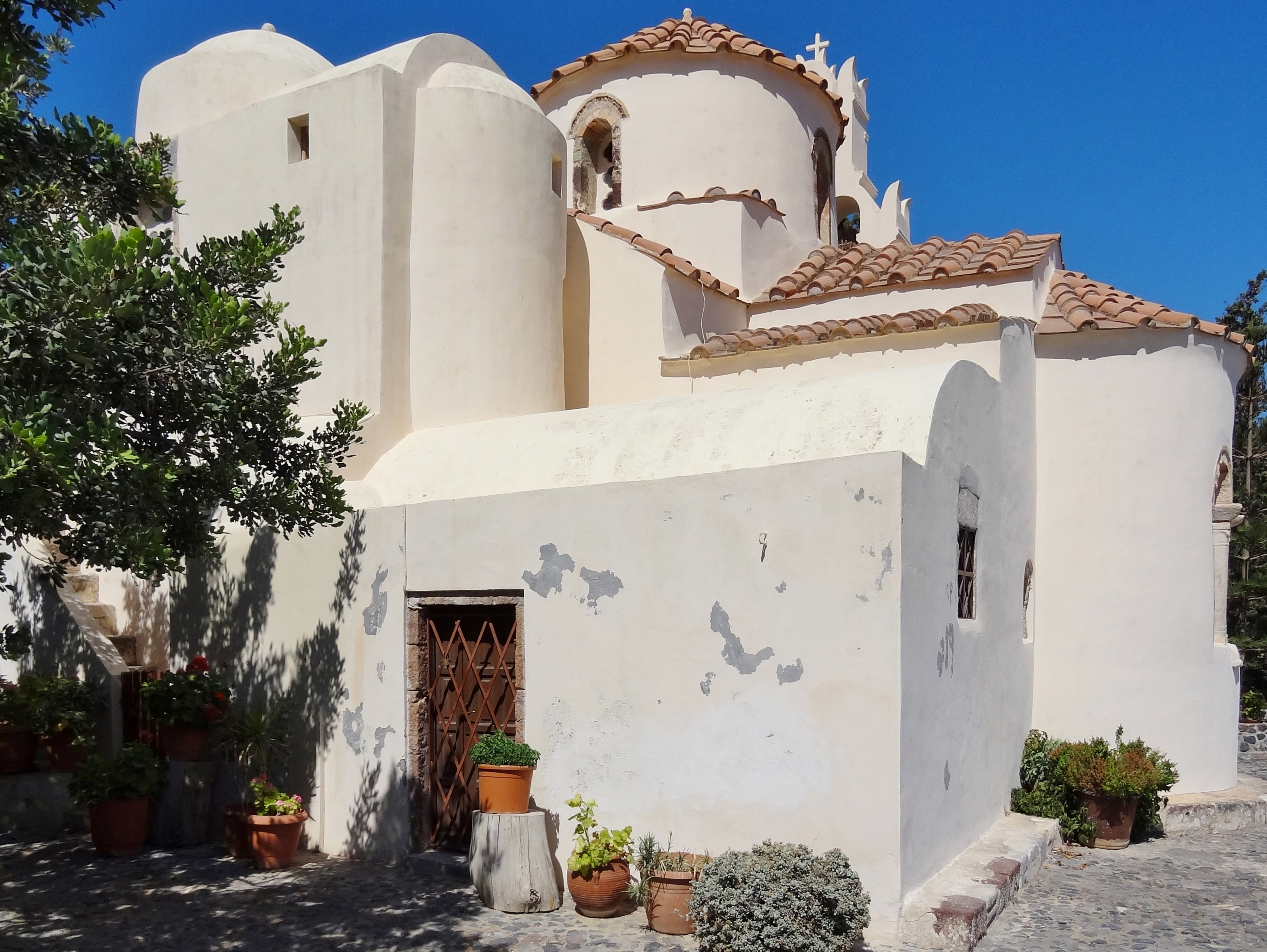 Kirche Panagia Episkopi (Παναγία Επισκοπή) in Mesa Gonia, Santorin (Thera), Kykladen, Griechenland